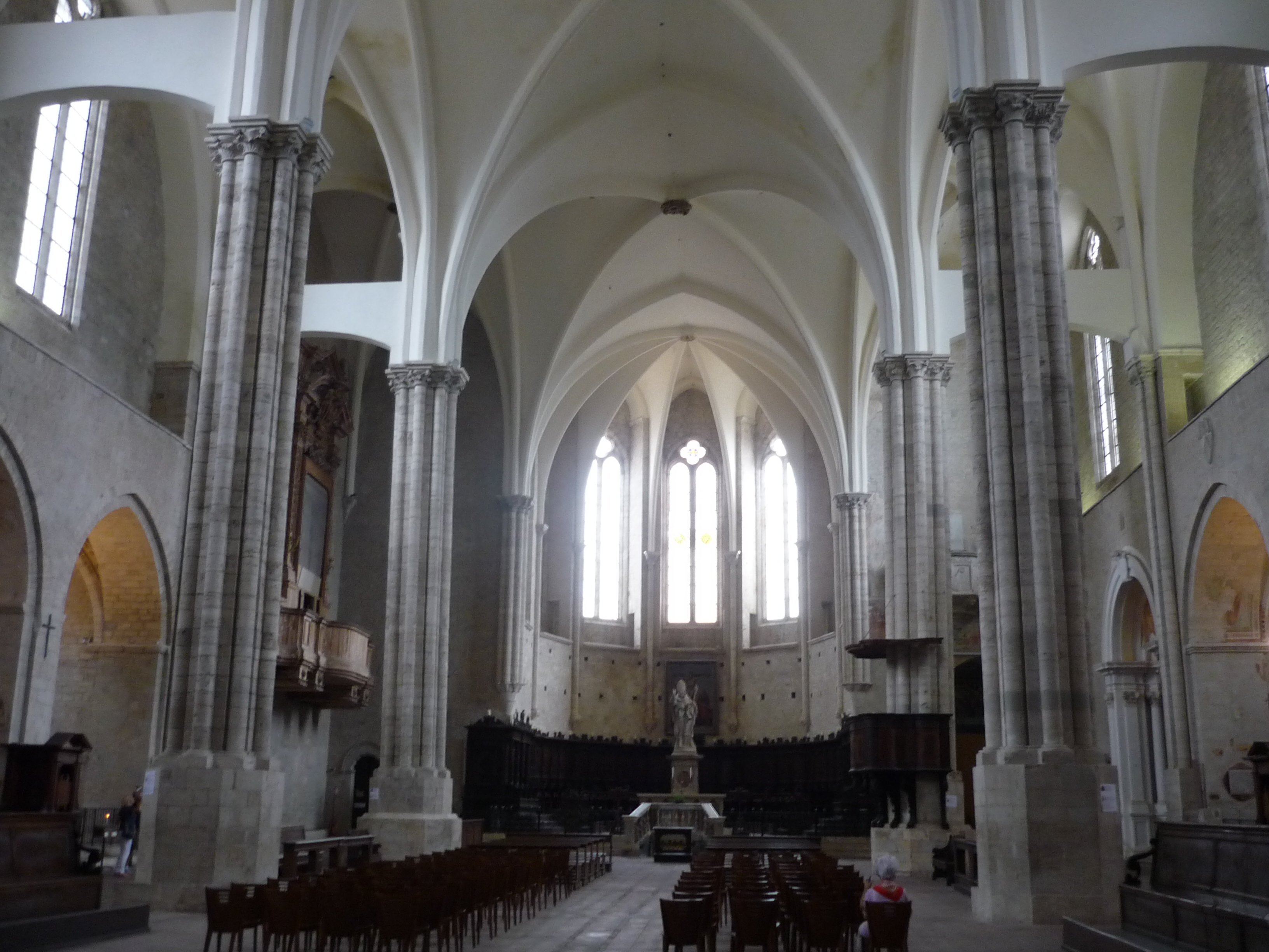 Tempio di San Fortunato - Interno This is a photo of a monument which is part of cultural heritage of Italy.